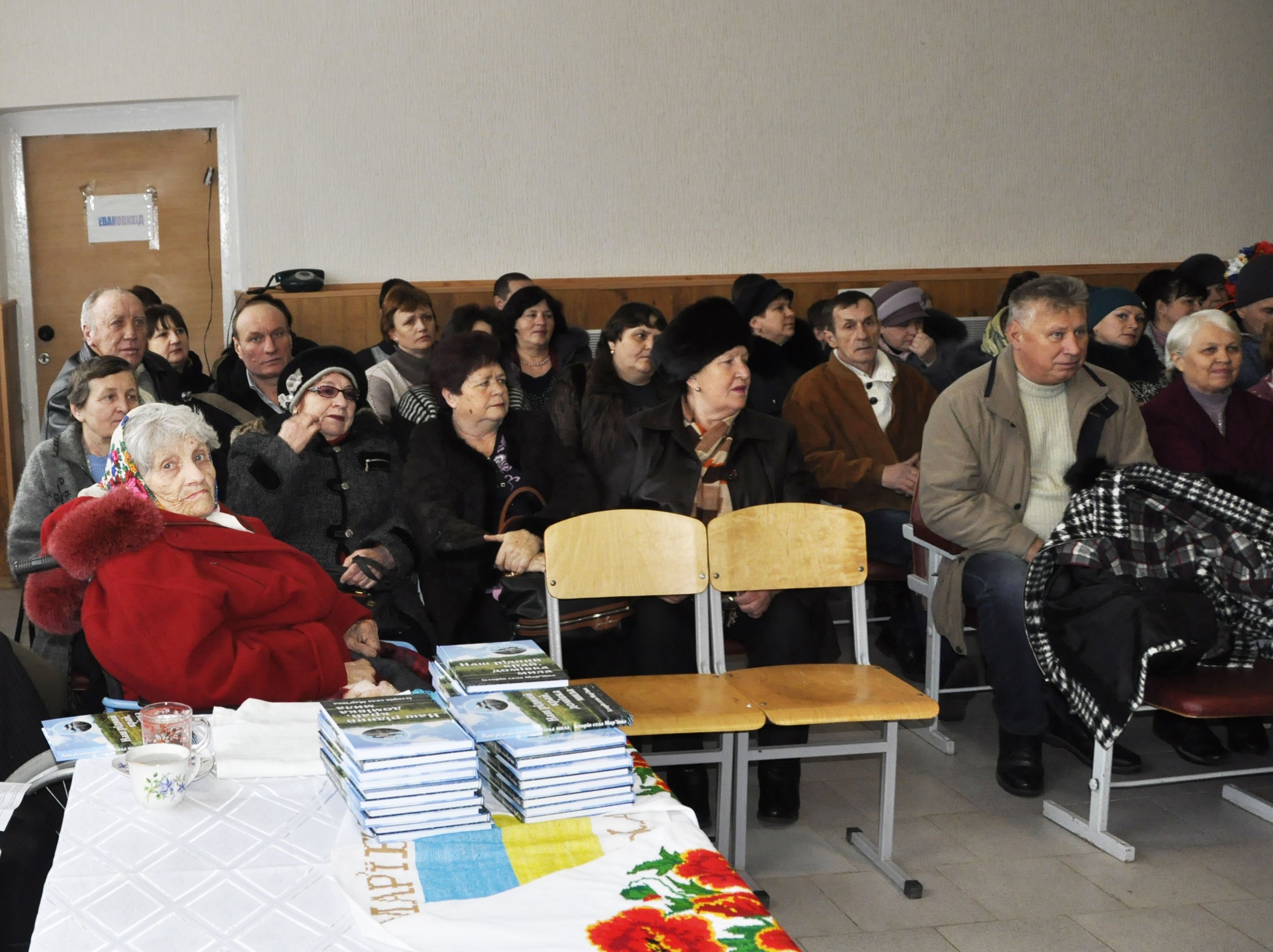 Село Марьевка. Презентация книги о Марьевке